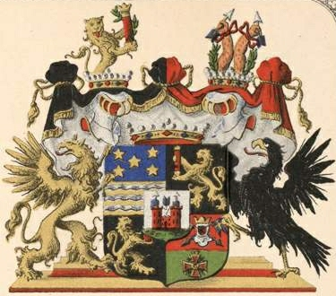 Campenhauseni suguvõsa vabahärravapp